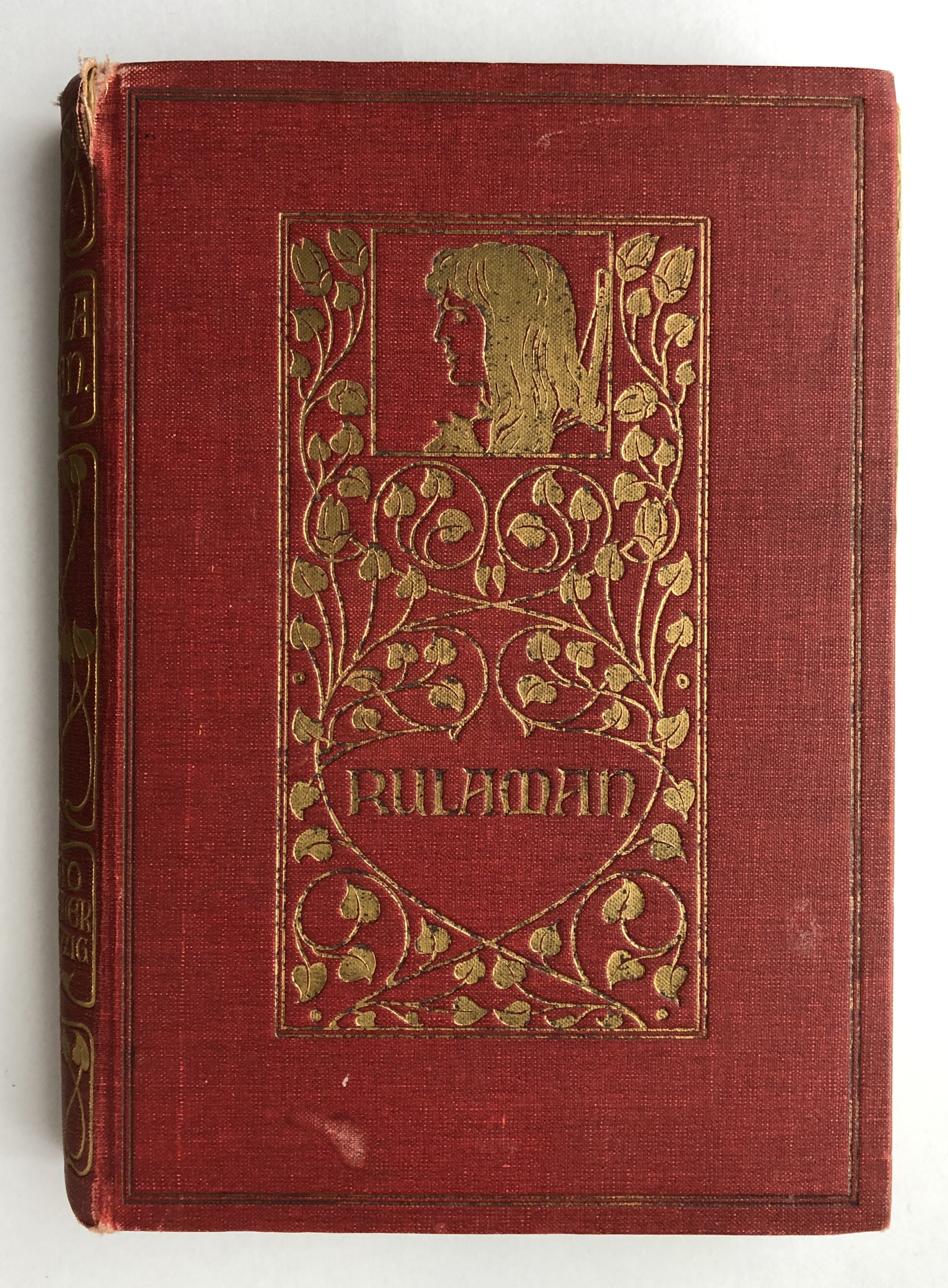 Illustrationen von Heinrich Leutemann aus dem Buch "Rulaman" von David Friedrich Weinland.